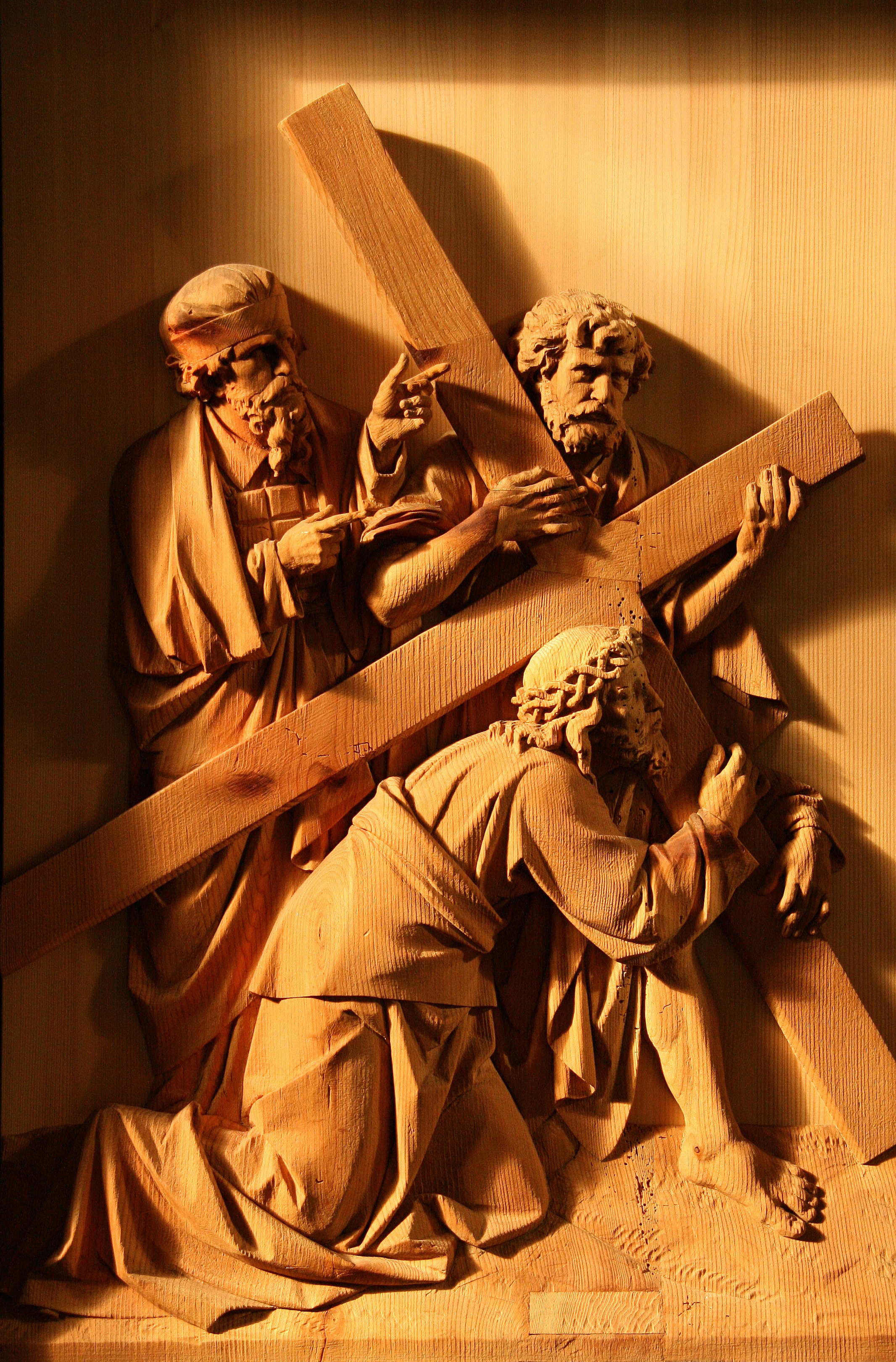 Pfarrkirche hl. Josef in Kennelbach, Vorarlberg. Kreuzwegrelief von August Valentin, 1906